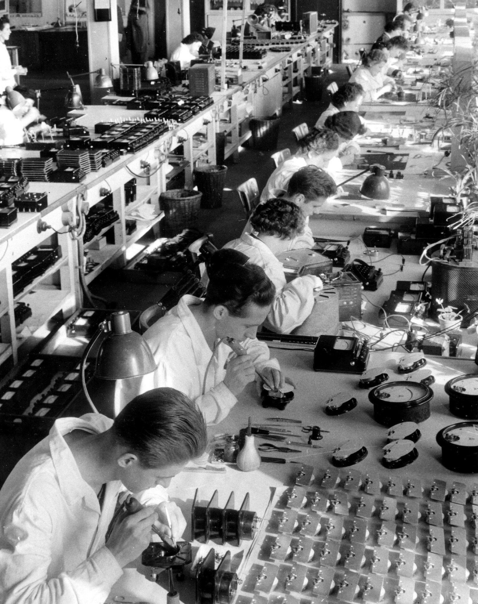 Az EKM gyár egyik szereldéje. 1949. június 8-án alakult.